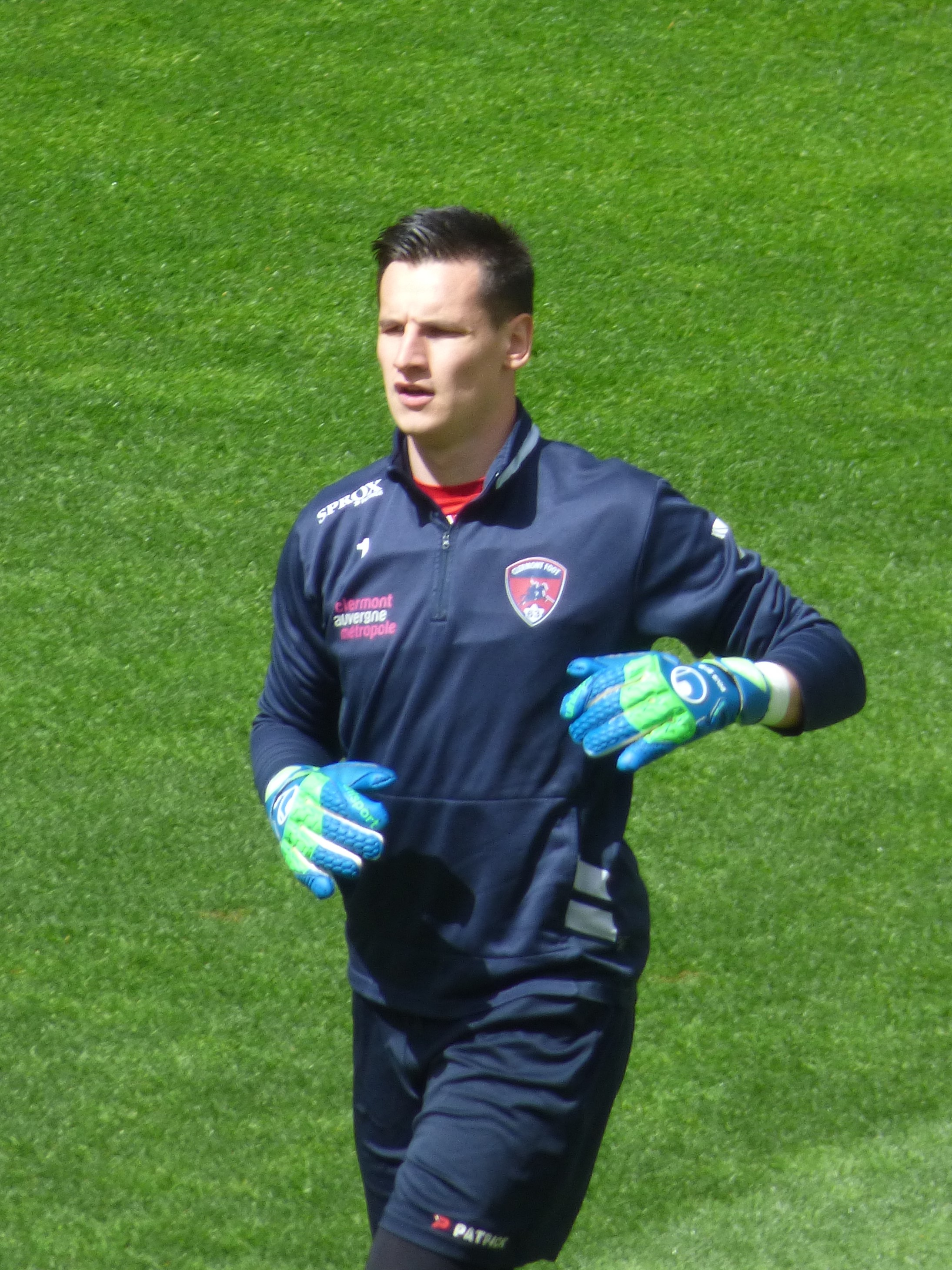 Rémy Descamps avant le match RC Lens / Clermont Foot 63, comptant pour la 36ème journée du championnat de France de football de Ligue 2 2018-2019, le 4 mai 2019, au stade Bollaert-Delelis.